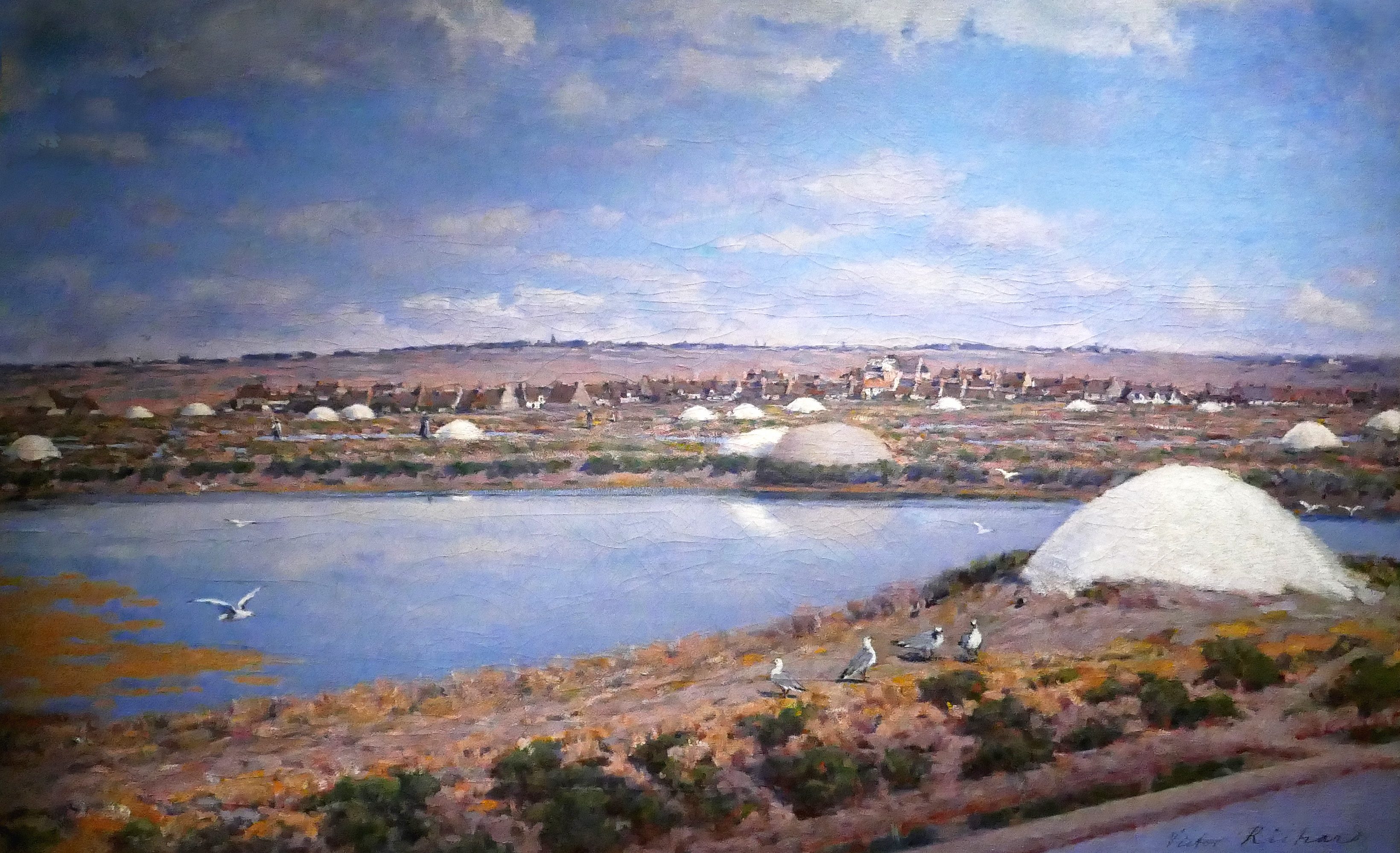 Lucien Victor Richard (1848-1914), Le pays du sel, Saillé. Vers 1904. Musée des marais salants à Batz-sur-Mer (Loire-Atlantique).